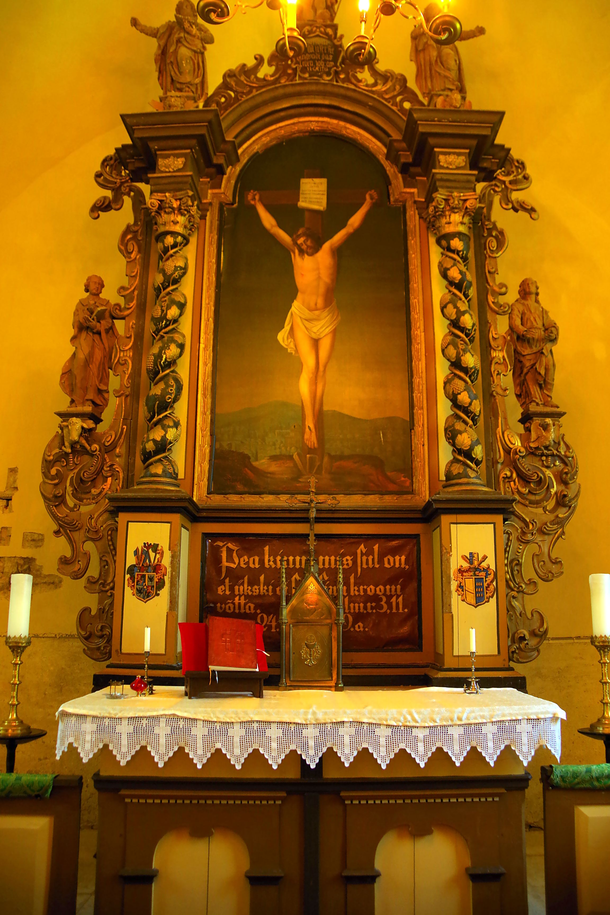 Altarimaal "Kristus ristil" , A.Sprengel, 1889 (õli, lõuend)